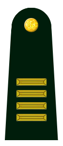 Mayor Ejército Peruano